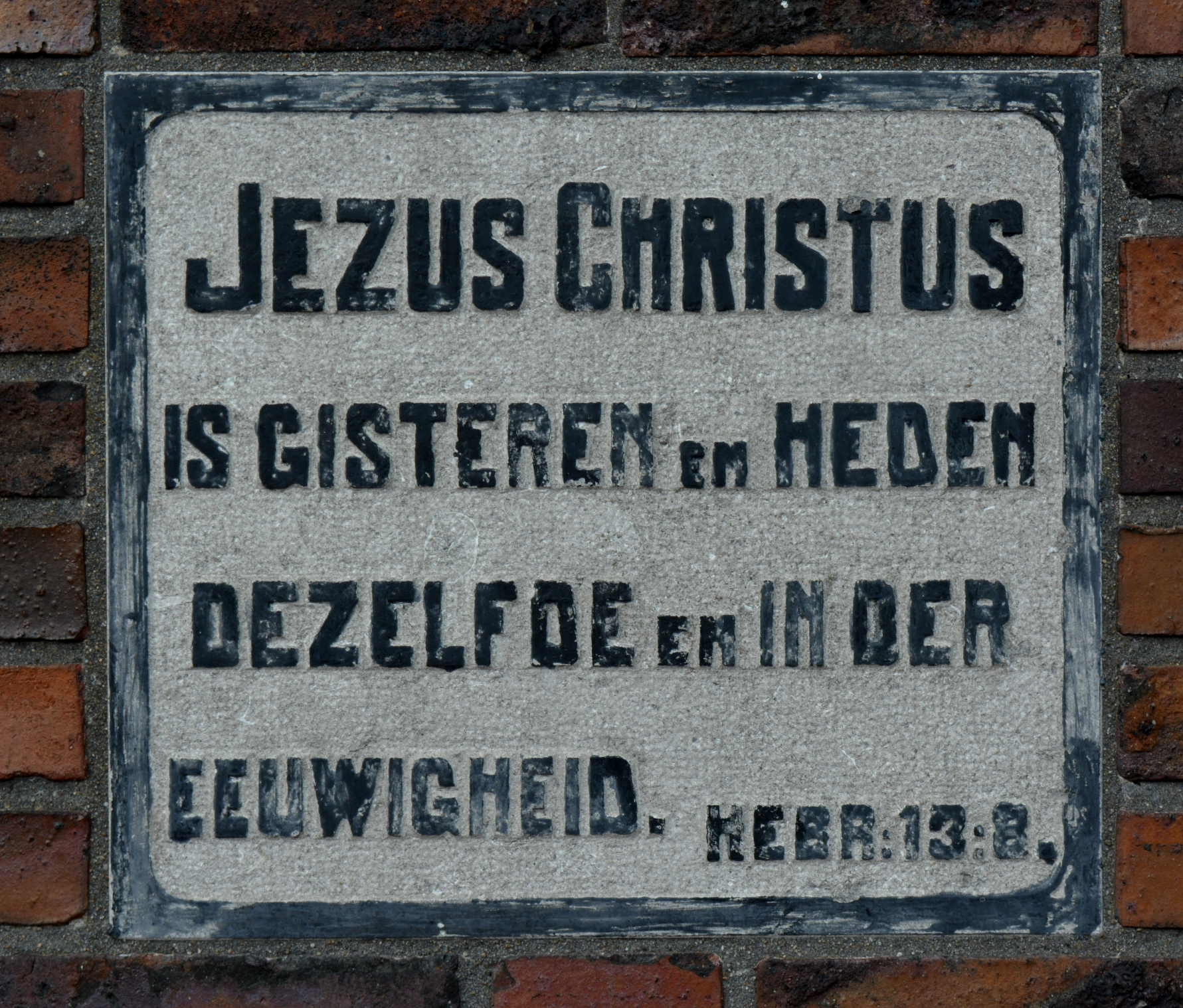 Grifformearde tsjerke (Haulerwyk), gevelstien